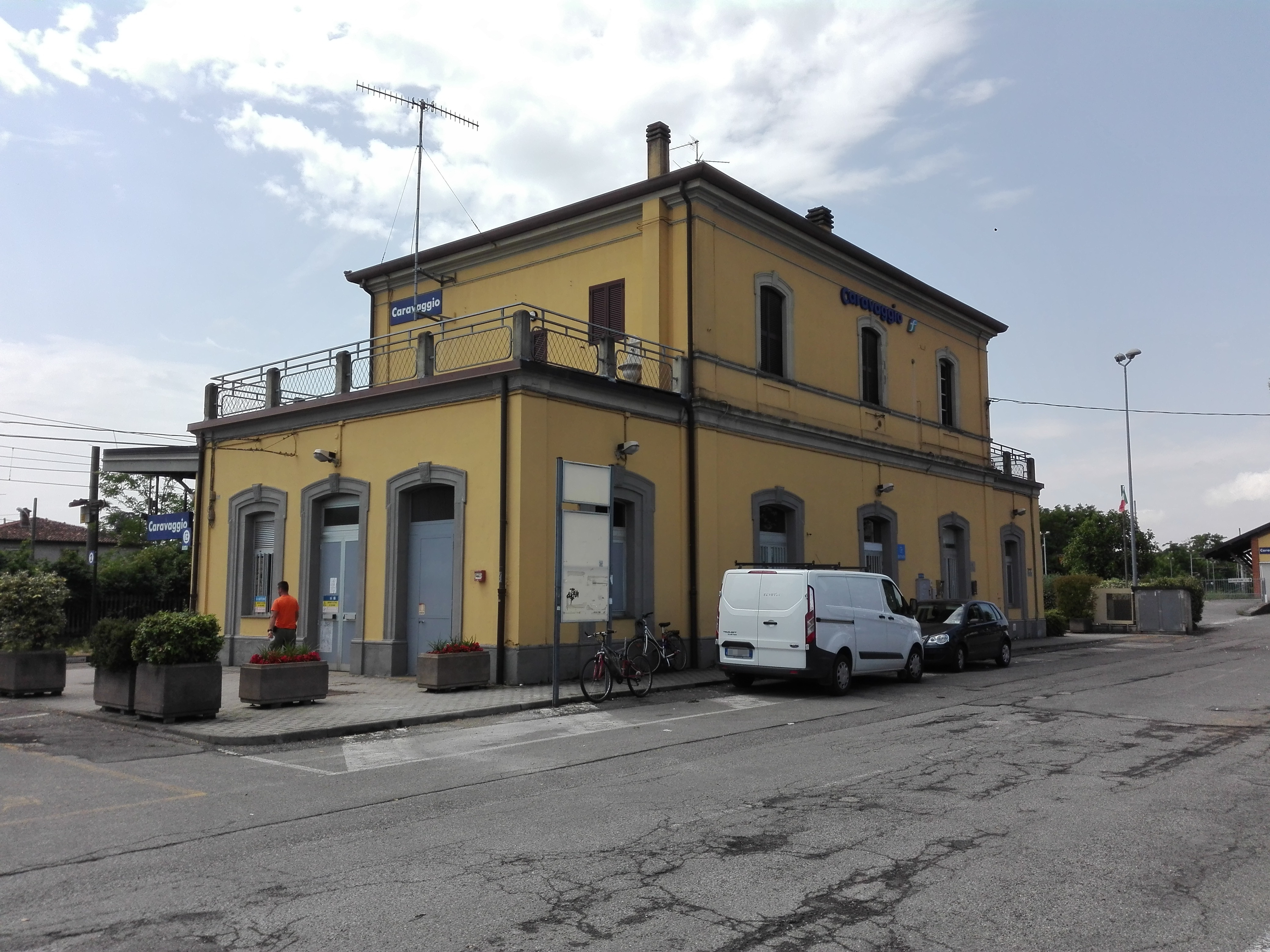 Edificio principale della stazione di Caravaggio, BG, Italia